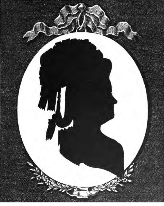 Александра Ивановна Остерман, ур. Талызина (1745—1793)